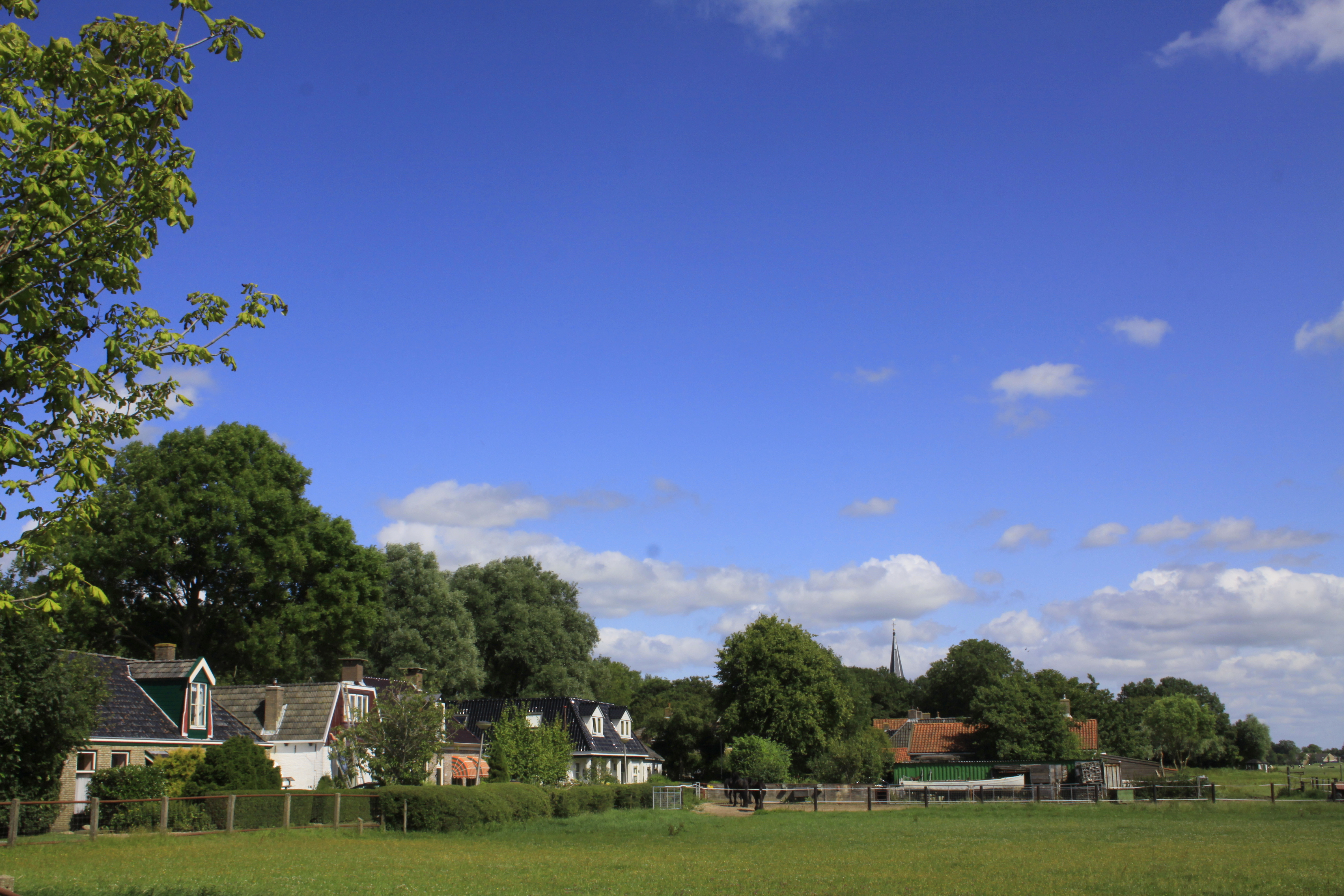 Britswert een dorp in de gemeente Littenseradeel in Friesland